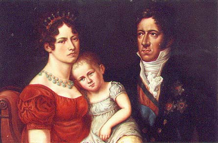 Porträt Ernst zu Münster mit Frau und Sohn Herbert (*1820) um 1821